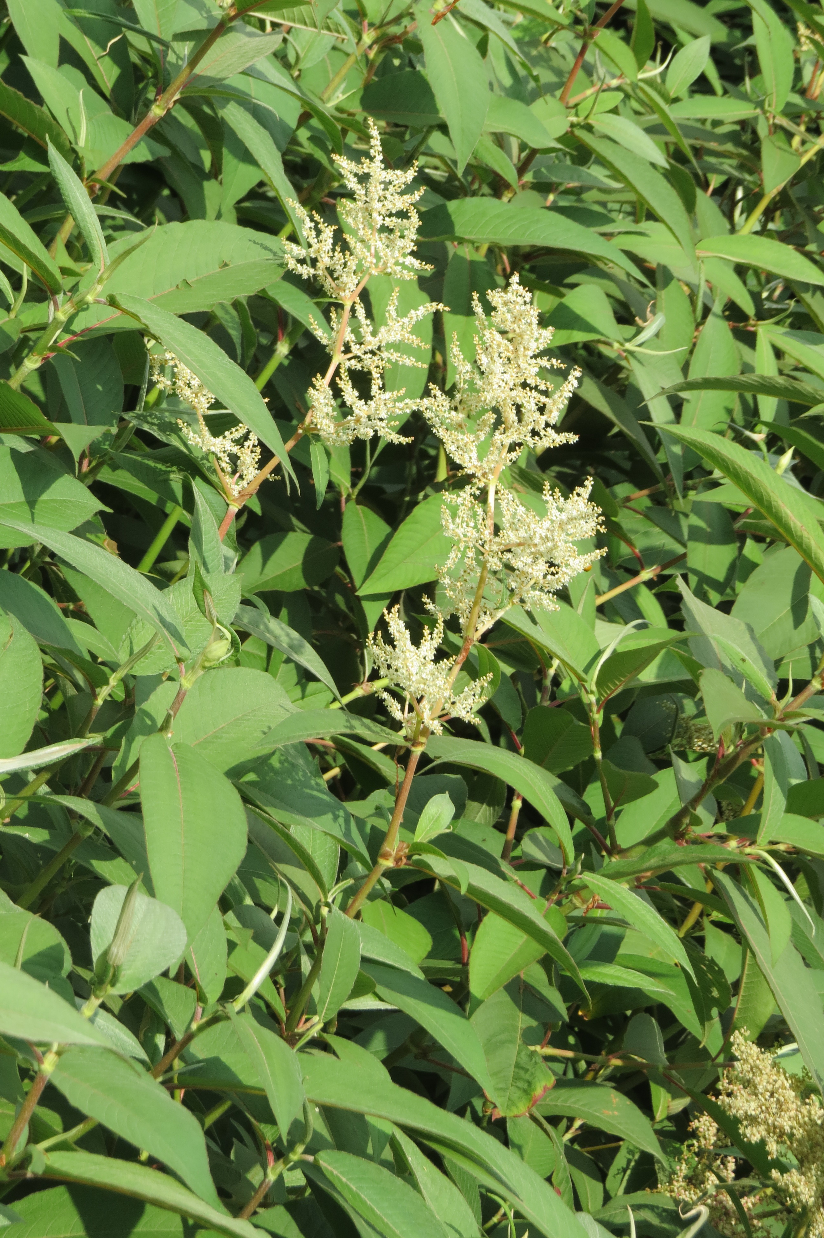 Photos by Vinayaraj